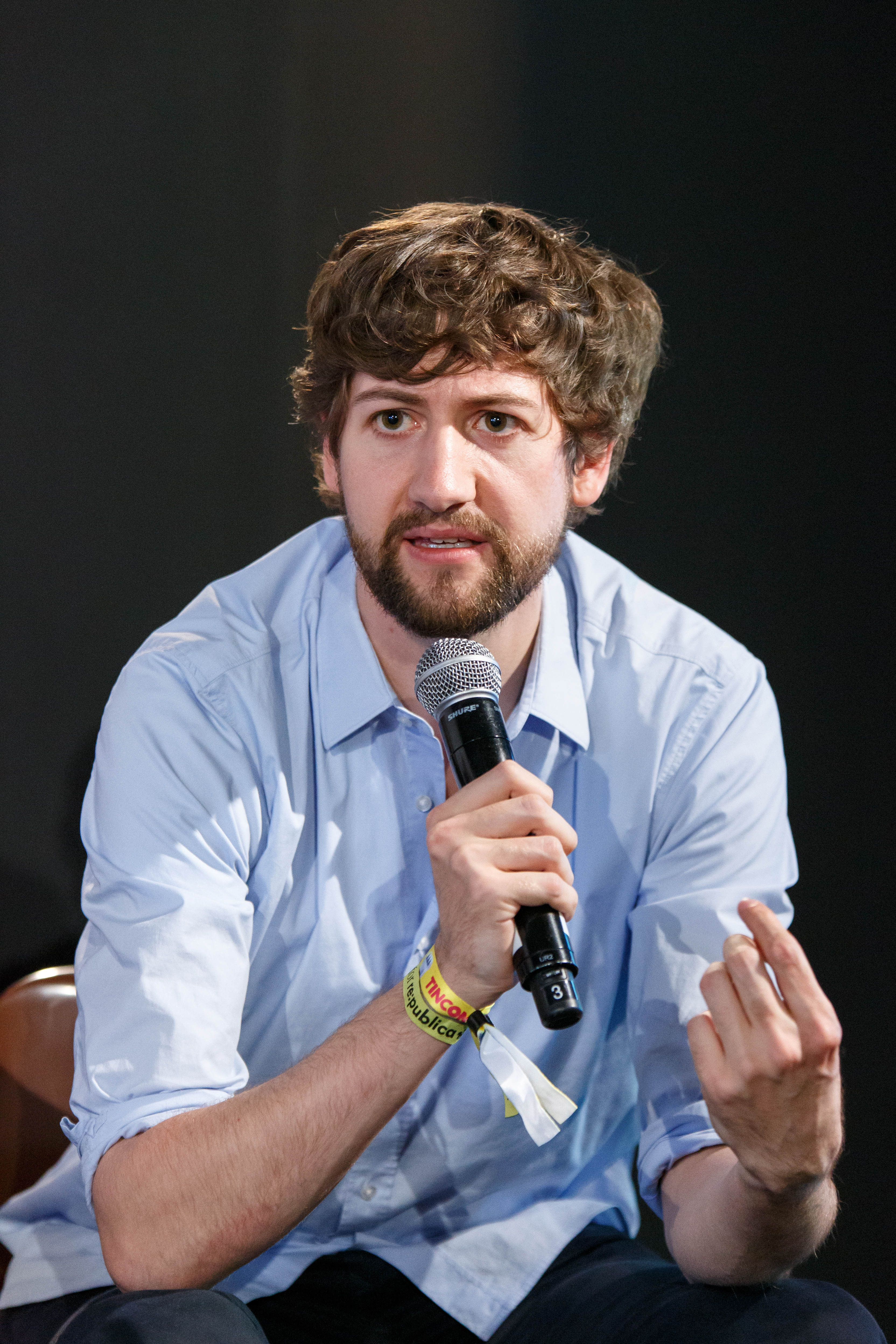 Discussion: Wieviel Wissenschaft hält YouTube und wieviel YouTube hält Wissenschaft aus? Speaker: Julia Althoff, Michael Büker, Florin Noël Haidar, Robin Blase, Annette Leßmöllmann, Amanda Brennan